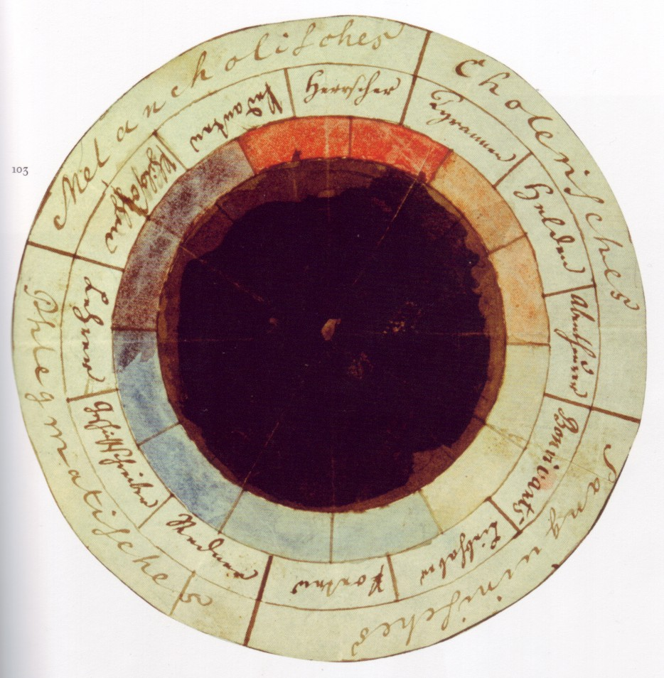 Studie zur Farbenlehre. Johann Wolfgang von Goethe und Friedrich Schiller: "Die Temperamentenrose". Cholerisches (rot/gelbrot/gelb): Tyrannen, Helden, Abenteurer Sanguinisches (gelb/grün/blaugrün) Bonvivants Liebhaber, Poeten Phlegmatisches (blaugrün/blau/blaurot): Redner, Geschichtsschreiber, Lehrer Melancholisches (blaurot/purpur/rot): Philosophen, Pedanten, Herrscher "Um das Mentale sichtlich darzustellen, verfertigten wir zusammen mancherlei symbolische Schemata. So zeichneten wir eine Temperamenten-Rose, wie man eine Windrose hat." (Goethe, Bekenntnisse ad a. 1798, zit. Döring, Die königin der blumen, 1835, p. 711)